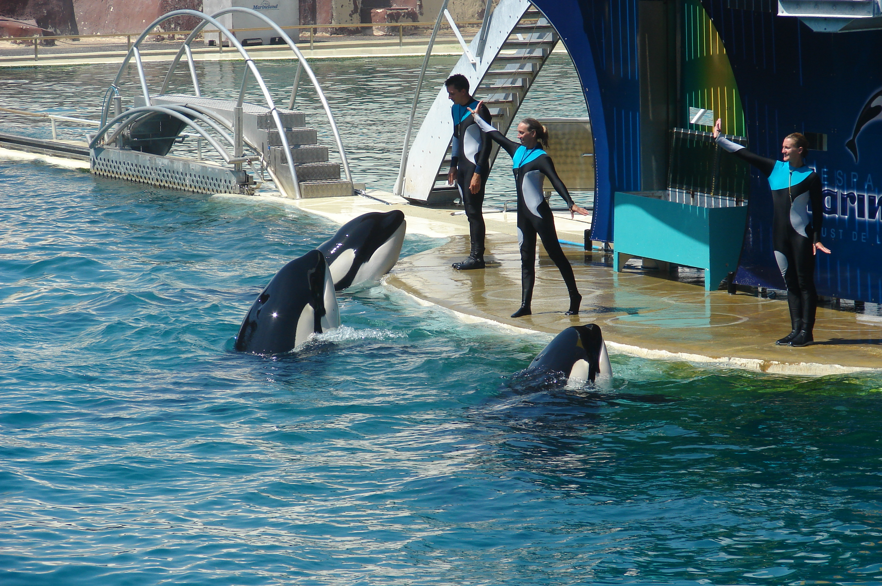 Antibes